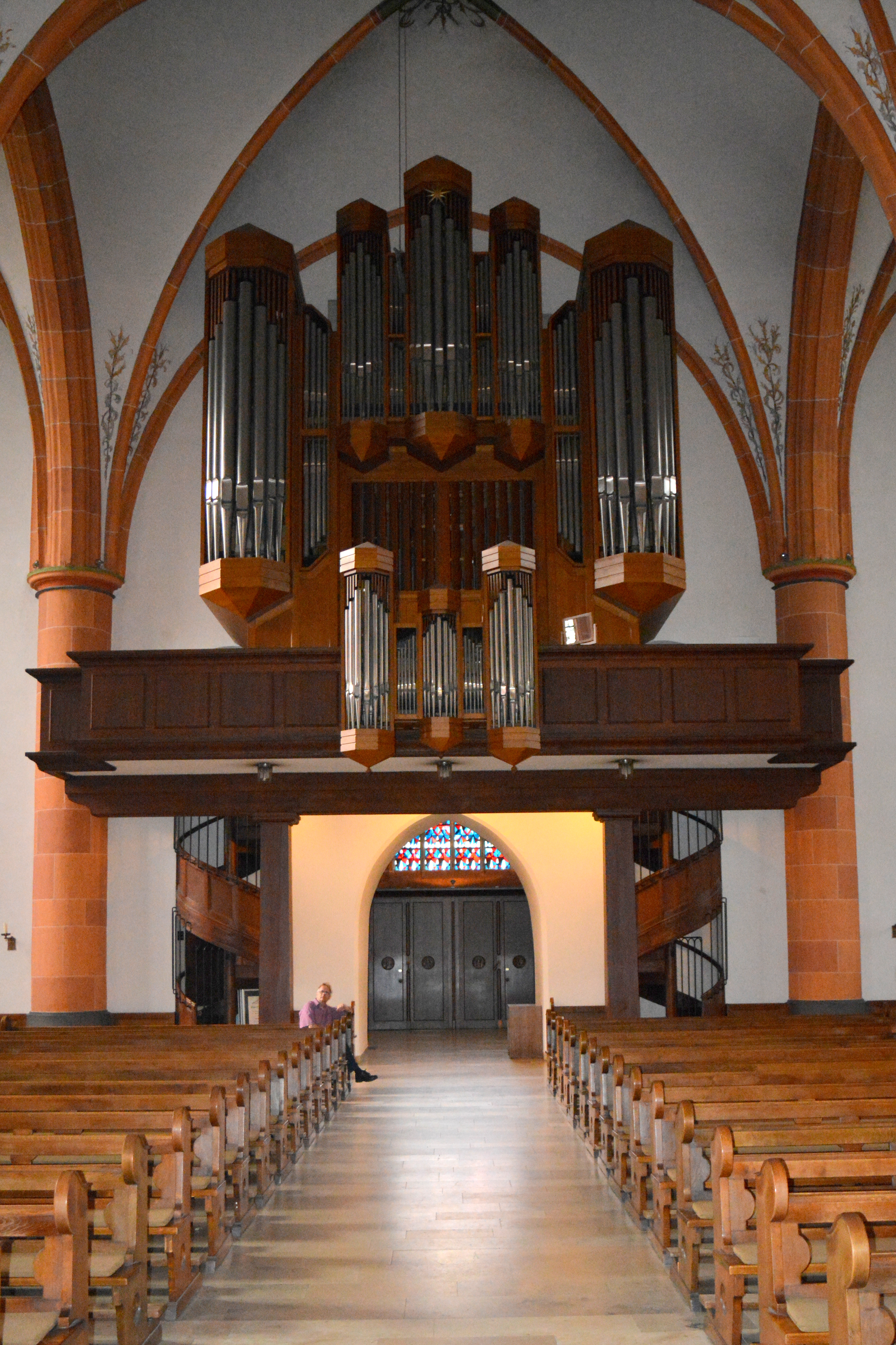 St. Remigius (Borken), Hauptorgel